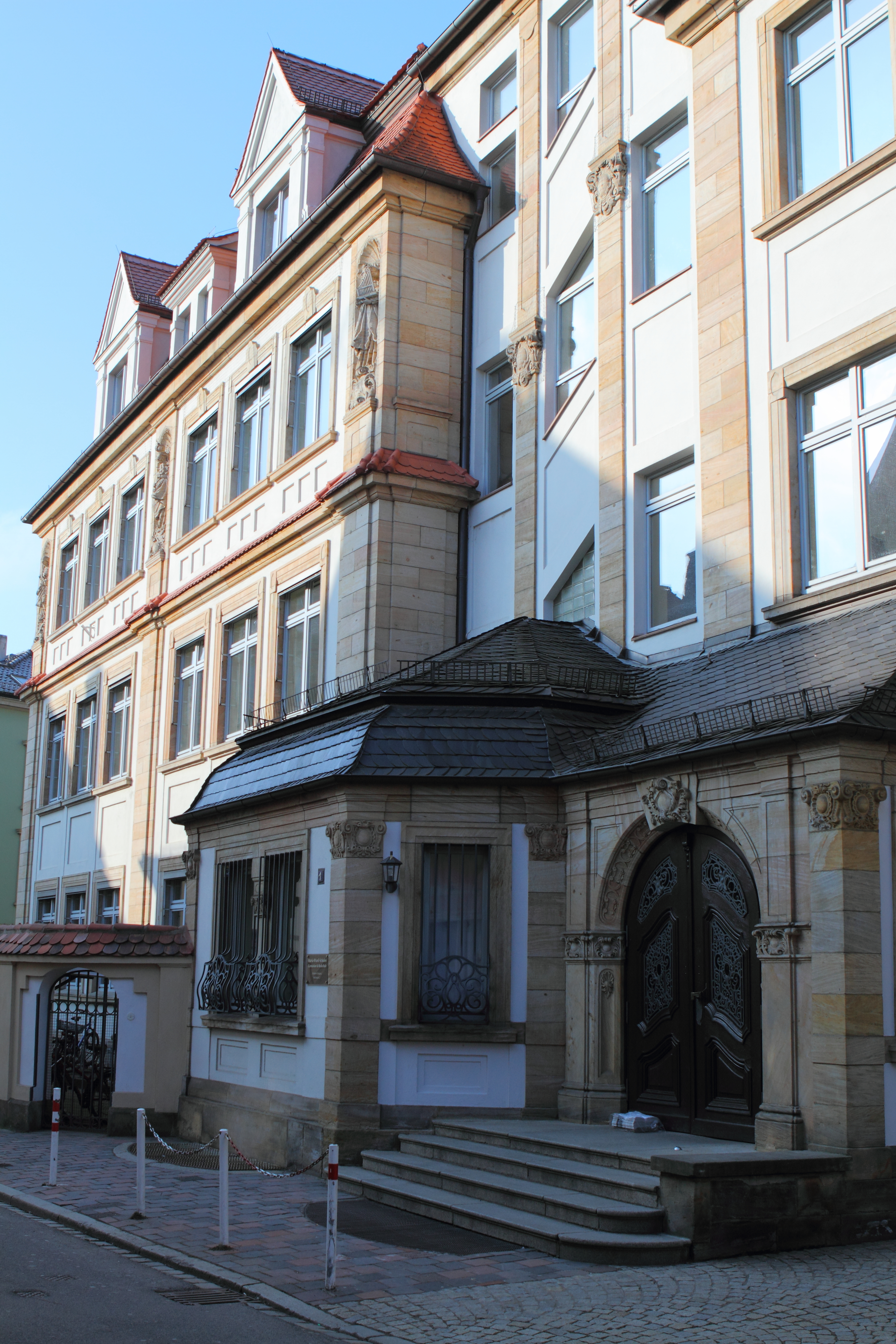 Maria-Ward-Schule (Bamberg)